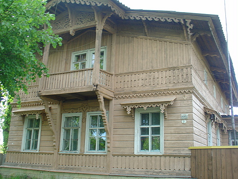 Деревянный дом в Егерской Слободе (Гатчина). Слобода застраивалась с 1857 по 1860 годы